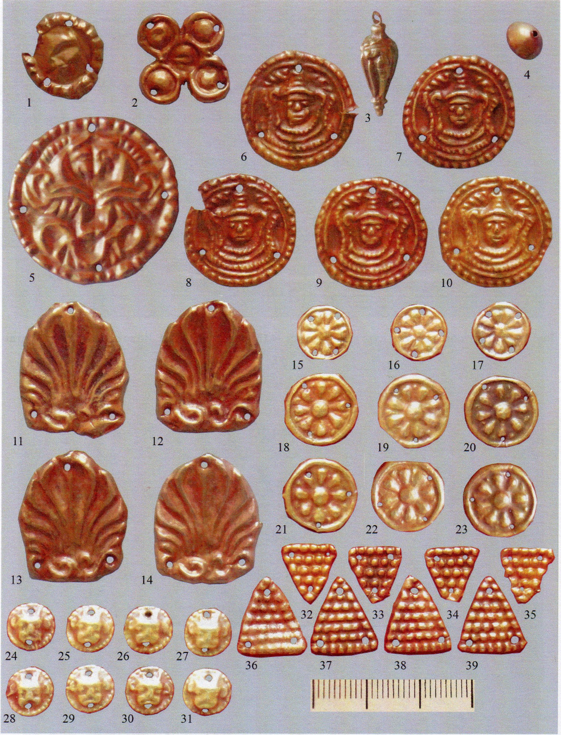 З поховань № 1-3